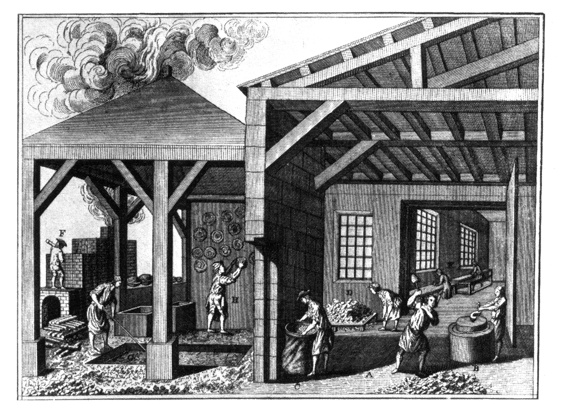 Sächsische Porzellanmanufaktur, frühes 18. Jahrhundert, Radierung